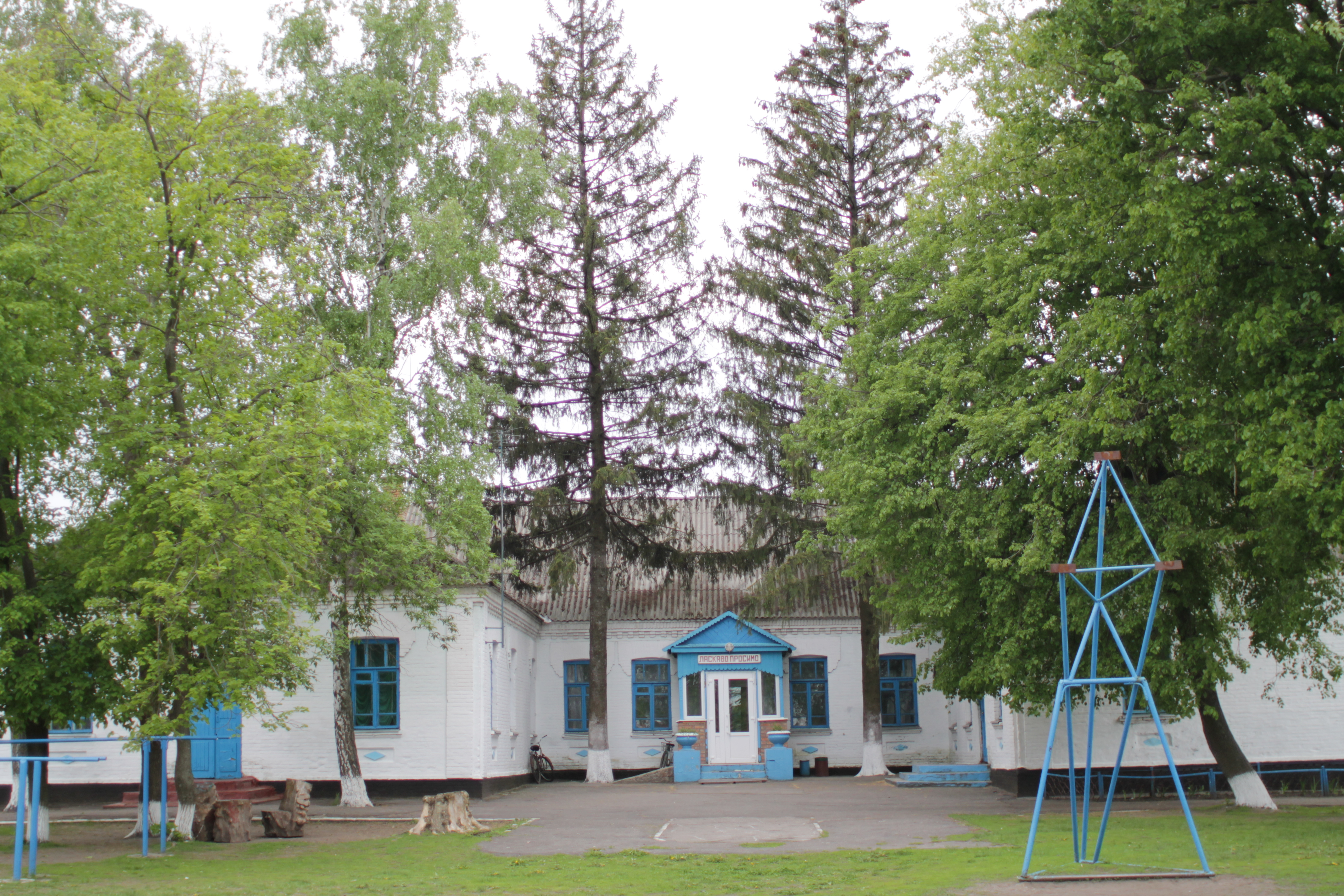 Зубанівська загальноосвітня школа I-III ступенів Глобинського району Полтавської області,3